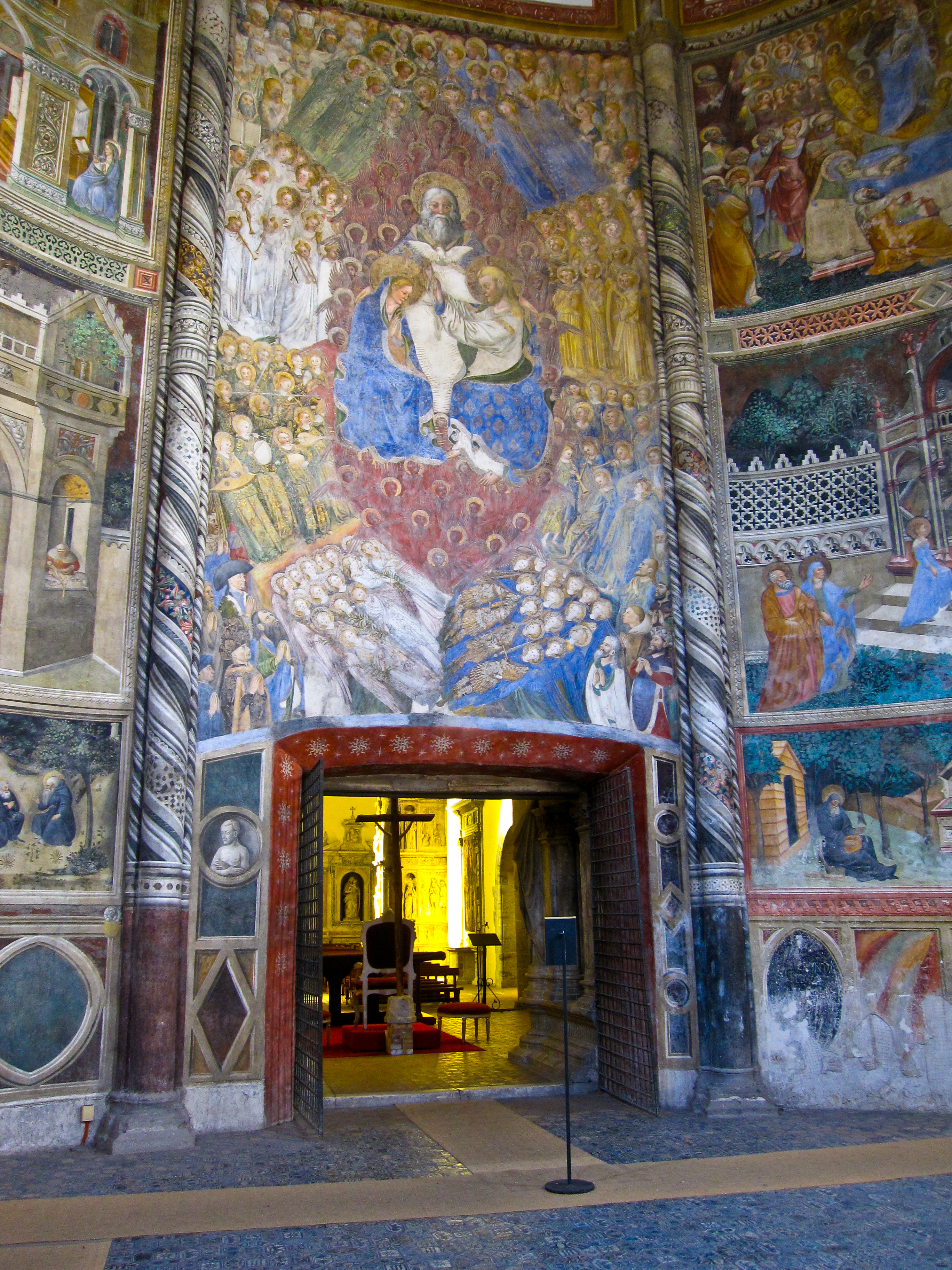 Cappella Caracciolo del Sole Chiesa di San Giovanni a Carbonara - Napoli